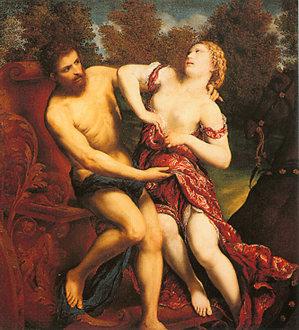 Galleria Salamon Paris Bordone (Treviso 1500-Venezia 1571), “Ratto di Proserpina”, olio su tela, cm 137,5x124,5